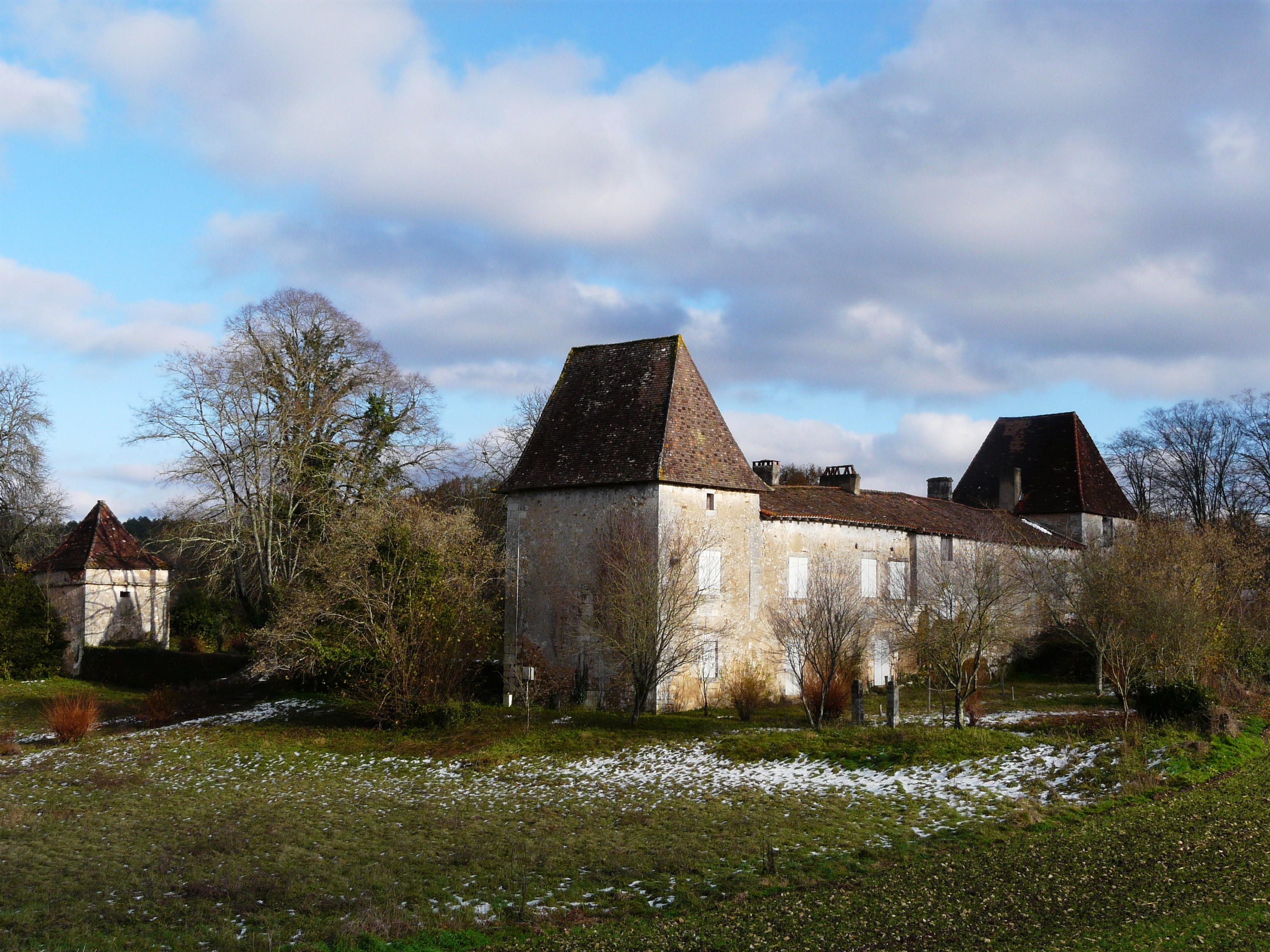 Le manoir de la Guionie vu de l'ouest, Lempzours, Dordogne, France.